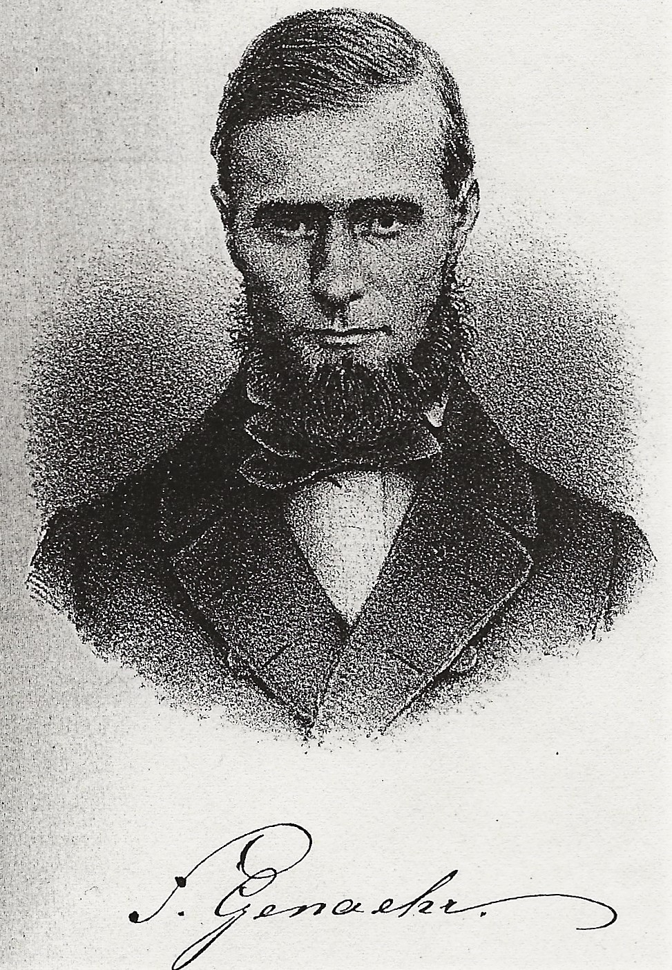 Portrait des Missionars der Rheinischen Mission in China von 1846 bis 1864